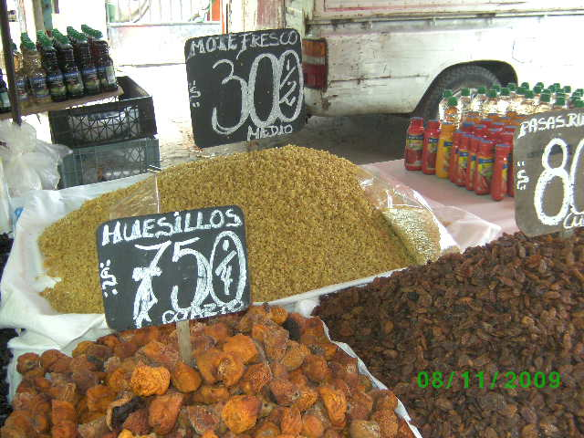 Feria que vende Mote y huesillos para consumo familiar